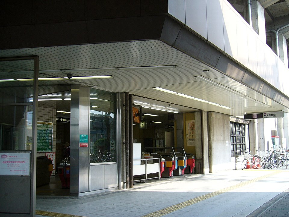 駒川中野駅改札 2007年2月17日 Bakkai撮影